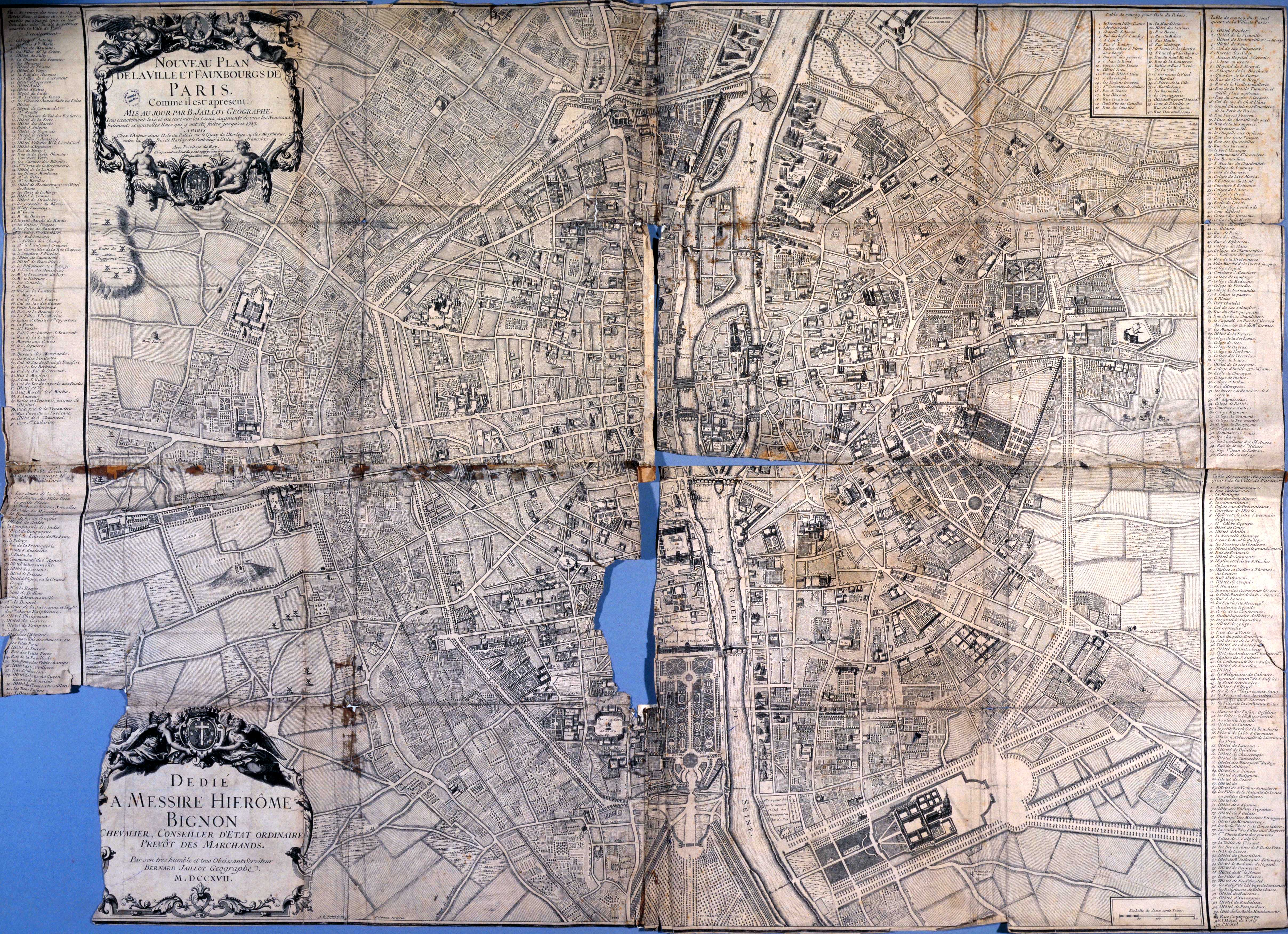 Plan de Paris, Cahiers de géographie de Saint-Cyr, 1717.